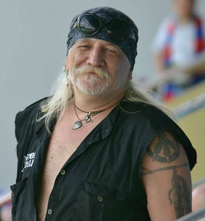 Алексей Меринов на футбольном матче